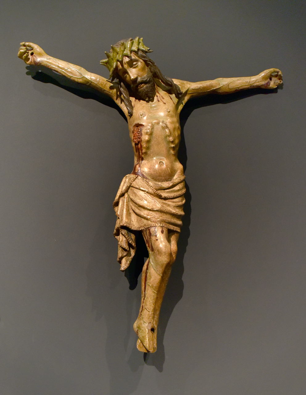 Ukřižovaný Kristus (1420-1430), expozice Galerie výtvarného umění v Chebu